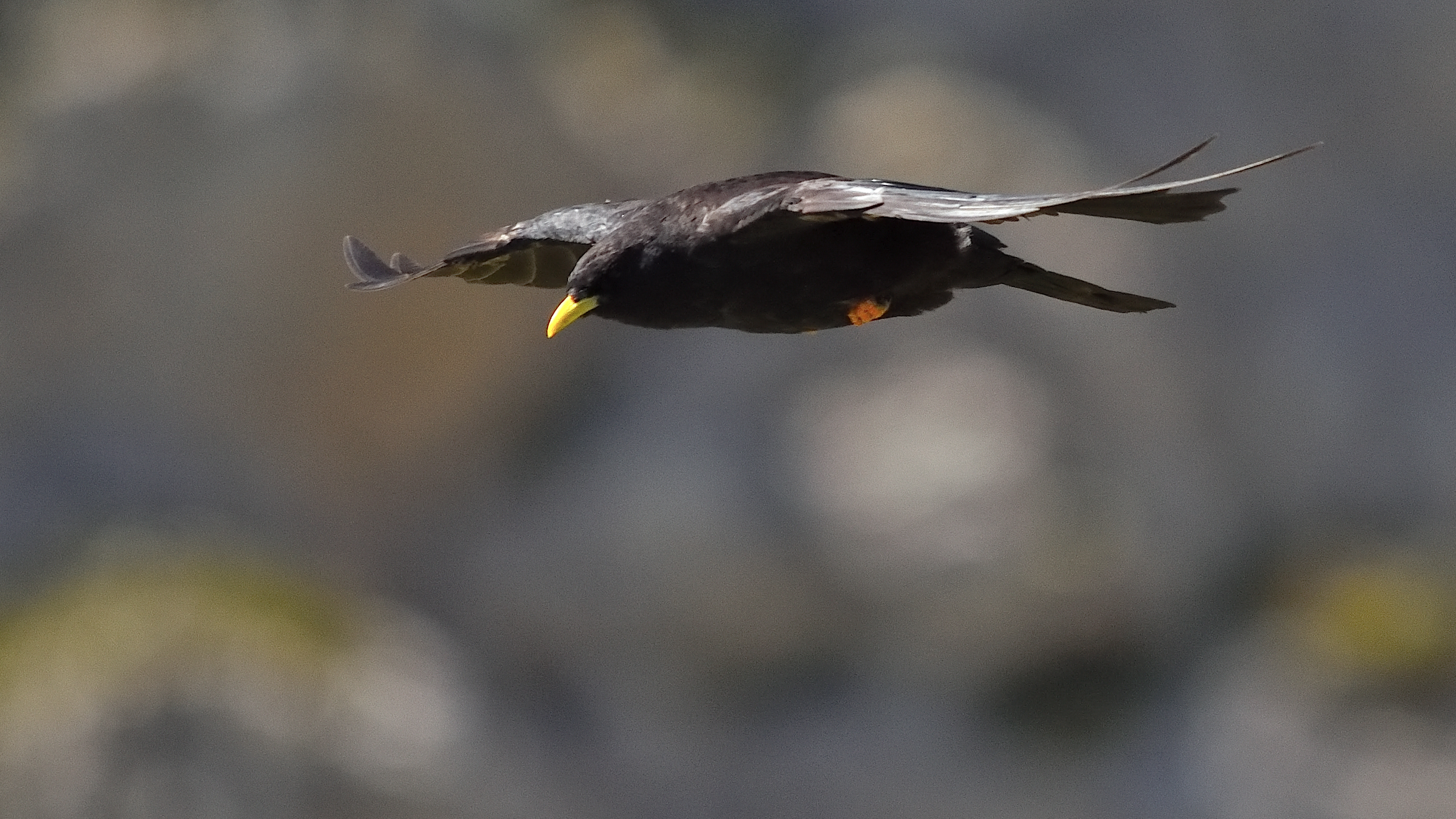 Parco nazionale delle Dolomiti Bellunesi (Q1086637) Un Gracchio alpino sorvola una valle in cerca di cibo.